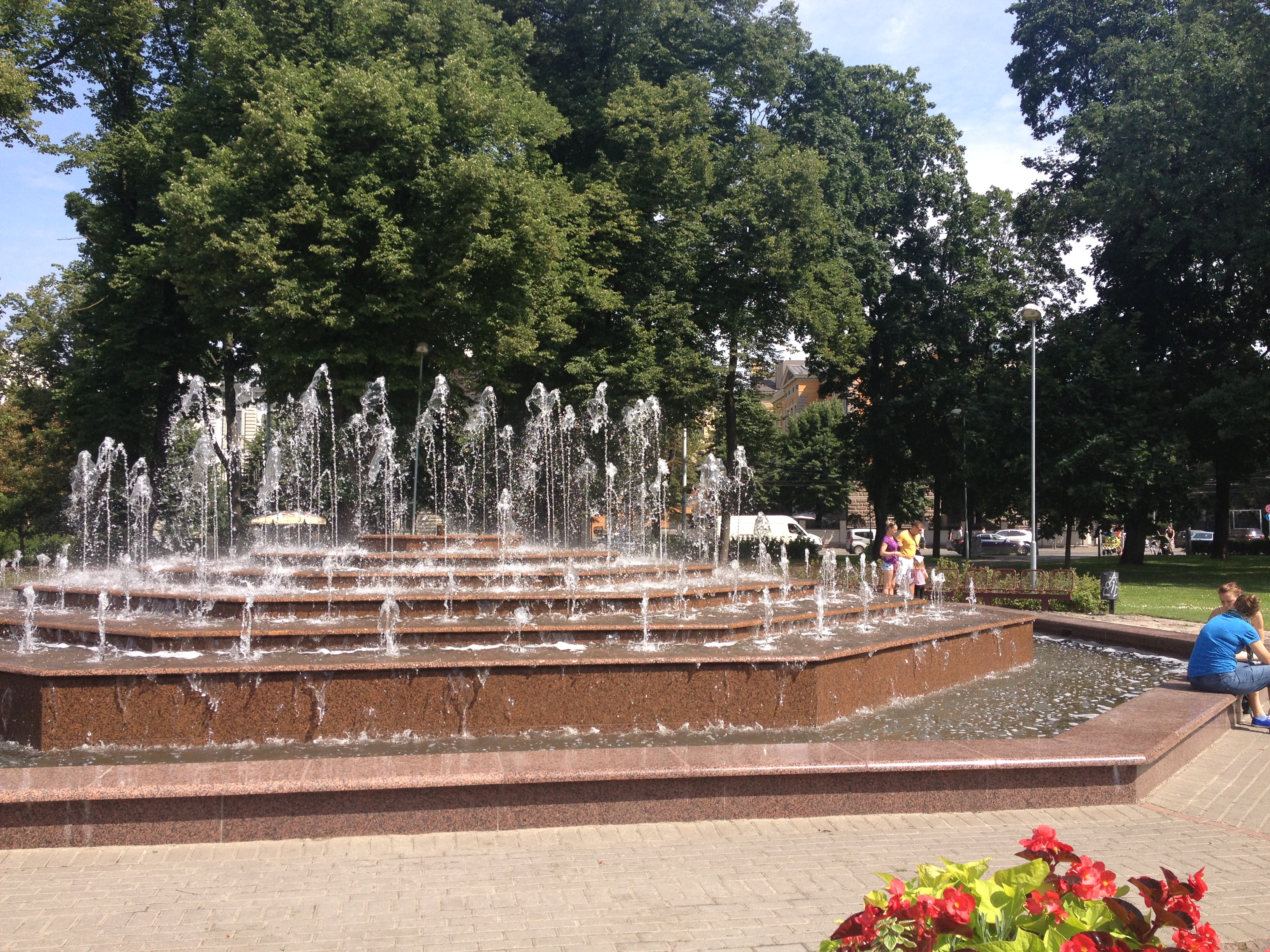 Strūklaka pie Kongresu nama